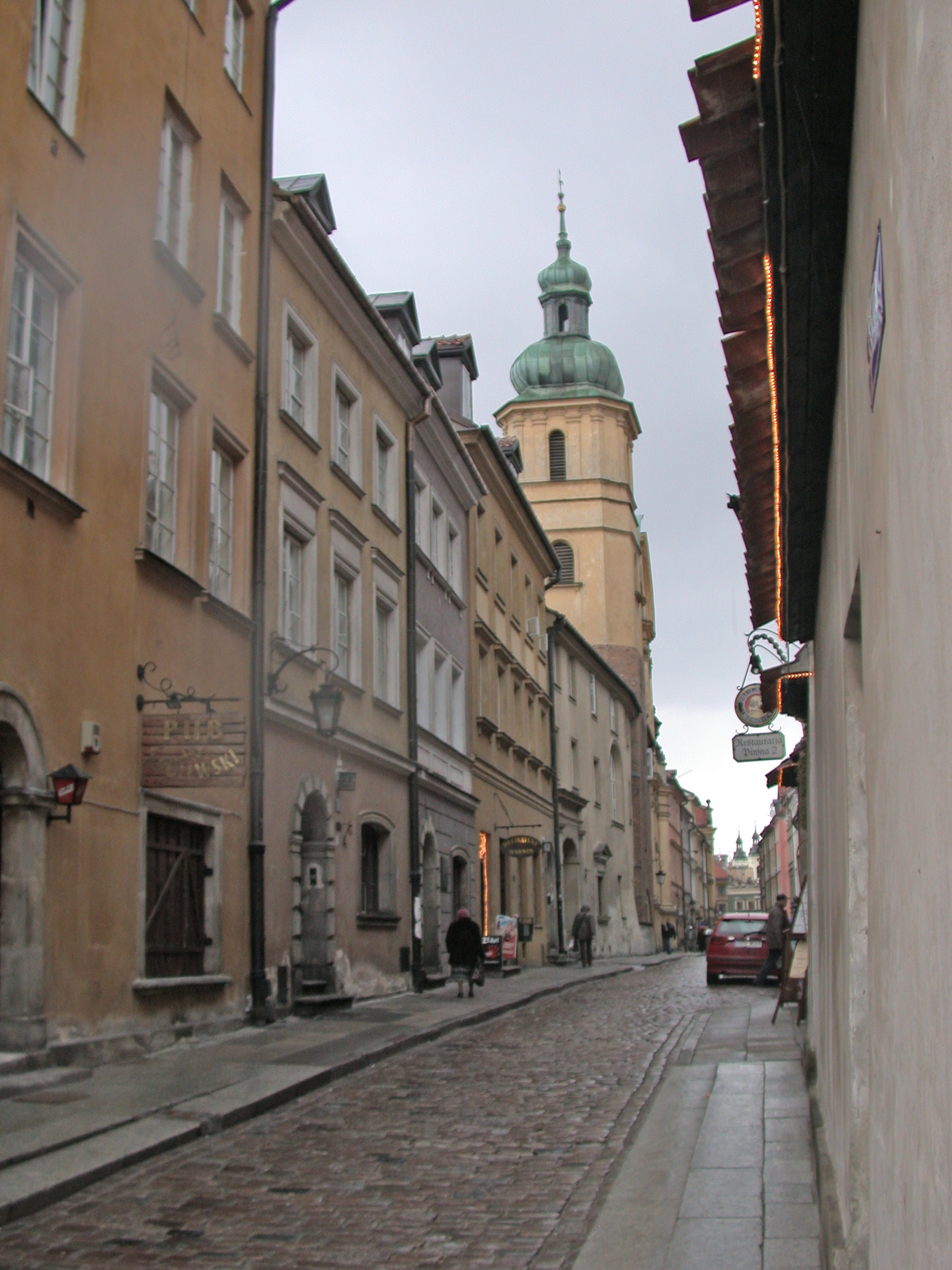 Varsavia, via Piwna da presso piazza del Castello Reale (con chiesa di San Martino)